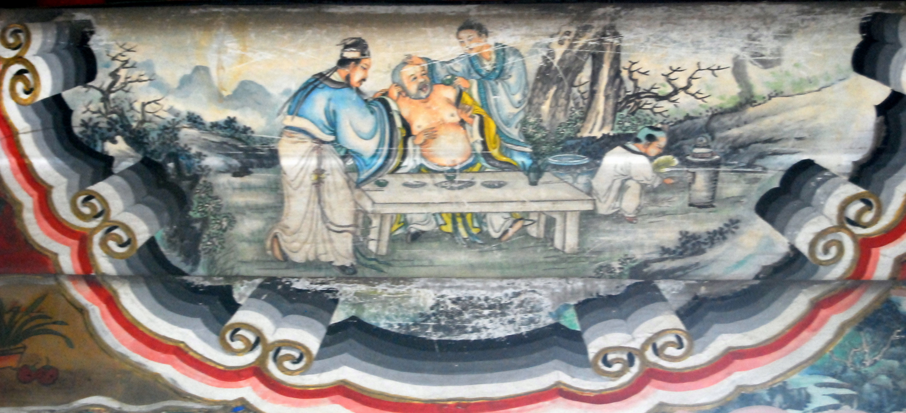 苏轼和佛印与黄庭坚喝酒，称为文人三才